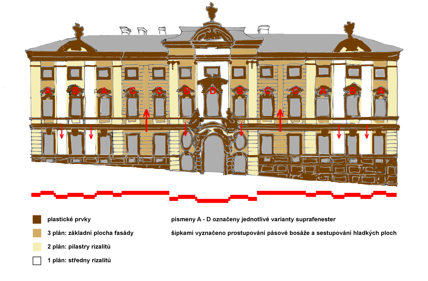 schéma hlavního průčeké Kolovratského (Thunovského) Paláce v Nerudově ulici v Praze